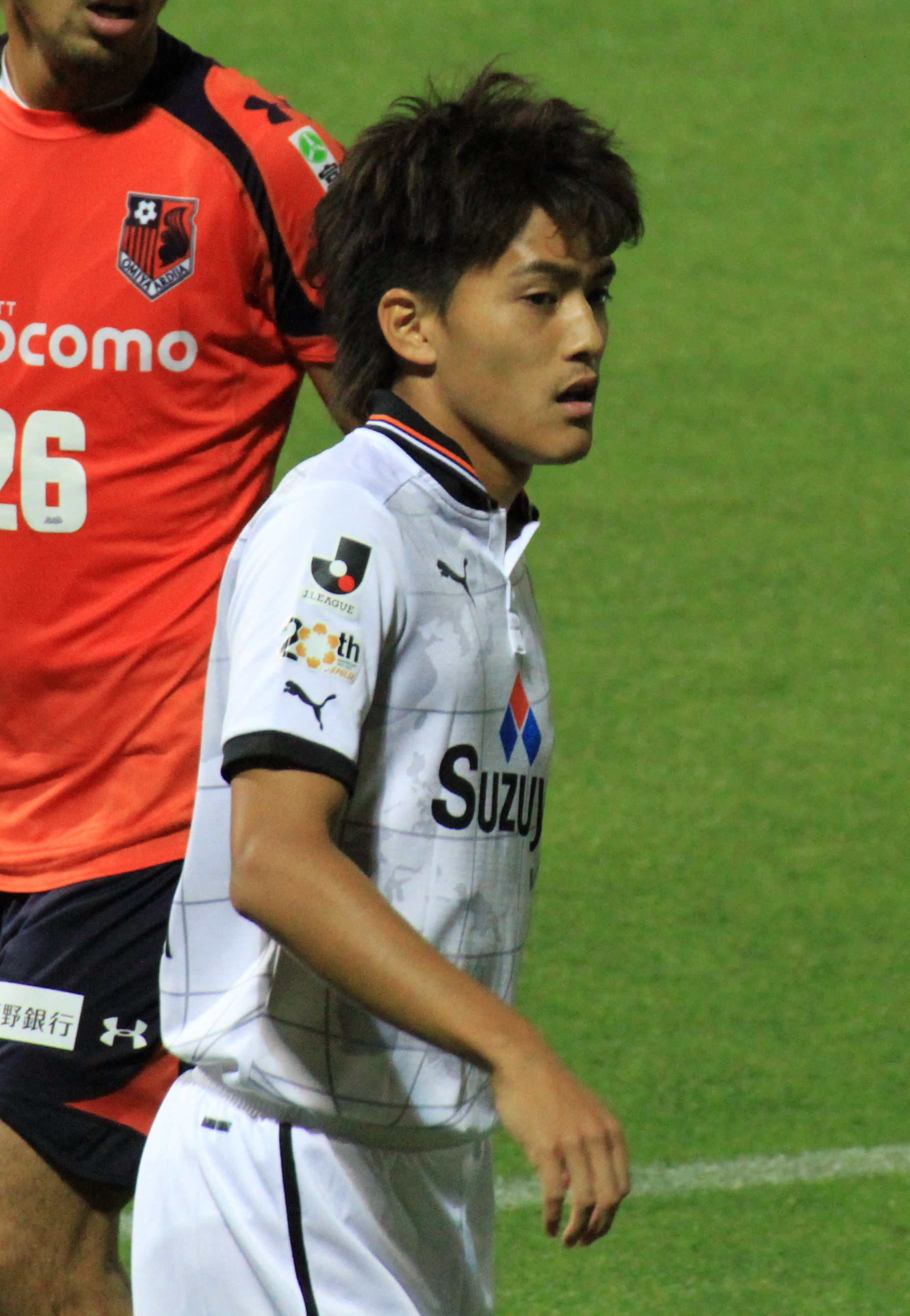 Toshiyuki Takagi of Shimizu S-Pulse.